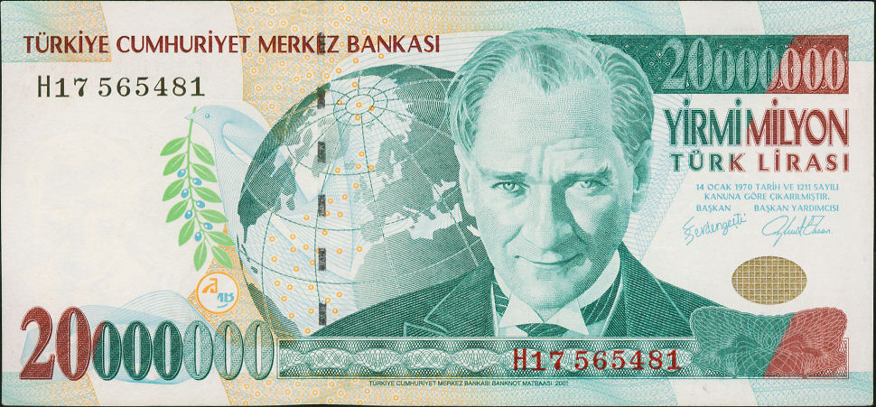 E7 serisi 20.000.000 TL'nin ön yüzü